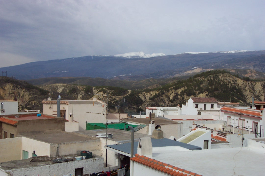 Sierra Nevada al fondo de Alcolea Sierra Nevada vista desde Alcolea de Almería Fotografía realizada por José Manuel Escudero, febrero de 2003.